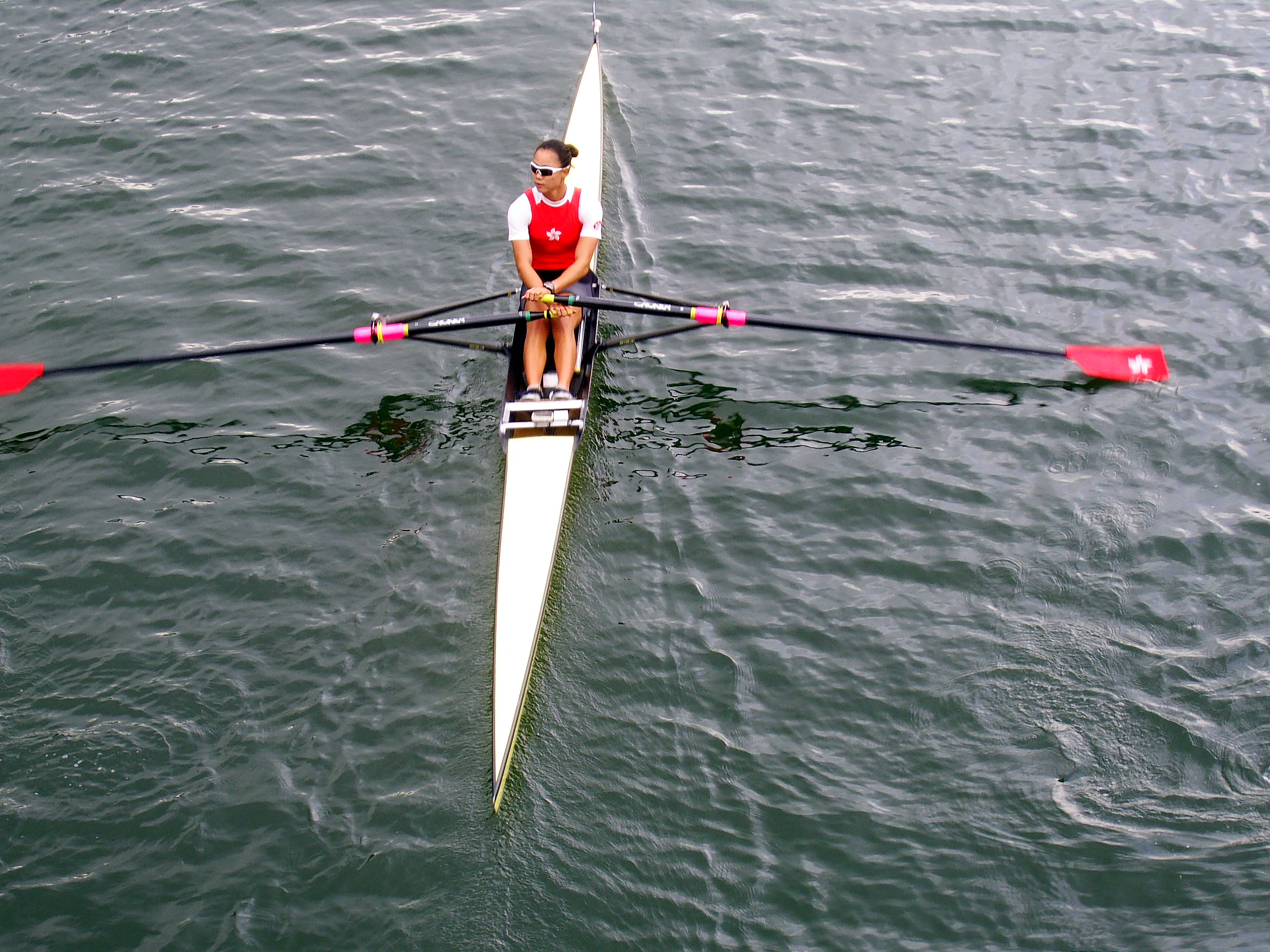 中文（香港）: 2009年東亞運女子單人艇銅牌得主李嘉文